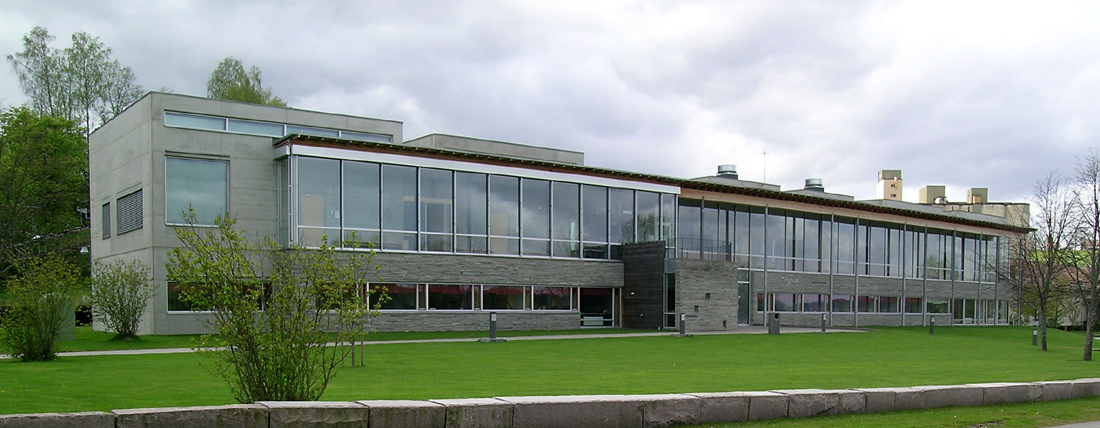 Eidsvoll tinghus. Arkitekt: Stein Halvorsen Arkitekter.